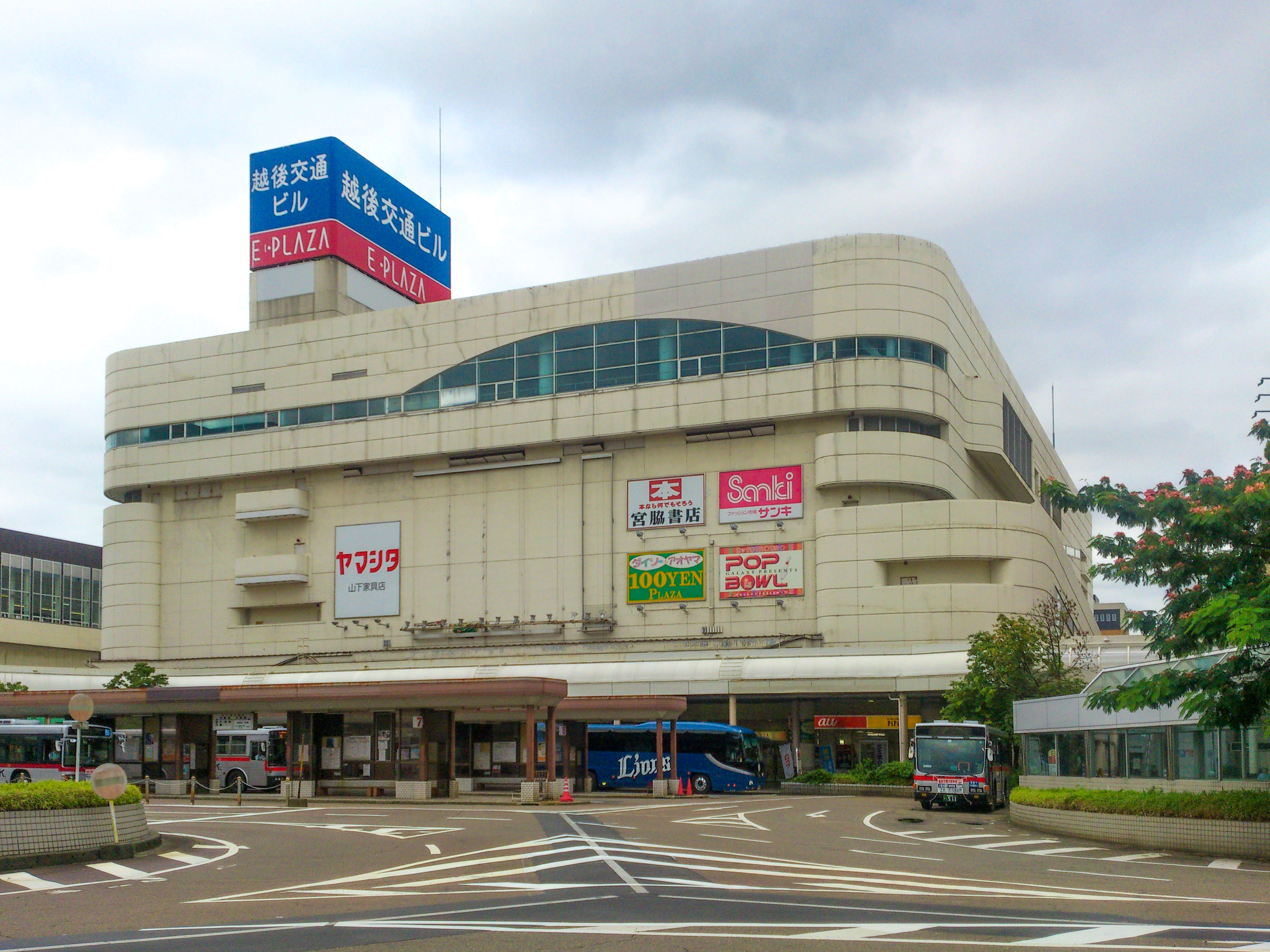 E.PLAZA